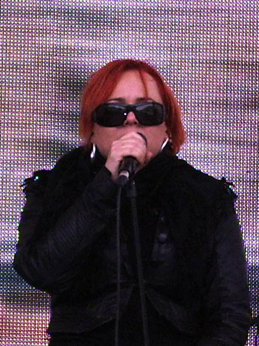 Marta Cugier, Lombard. Rzeszów 19.06.2010